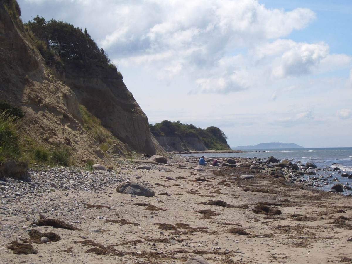 Naturschutzgebiet Nordwestufer Wittow und Kreptitzer Heide. In der Ferne ist die Insel Hiddensee zu erkennen (Dornbusch).